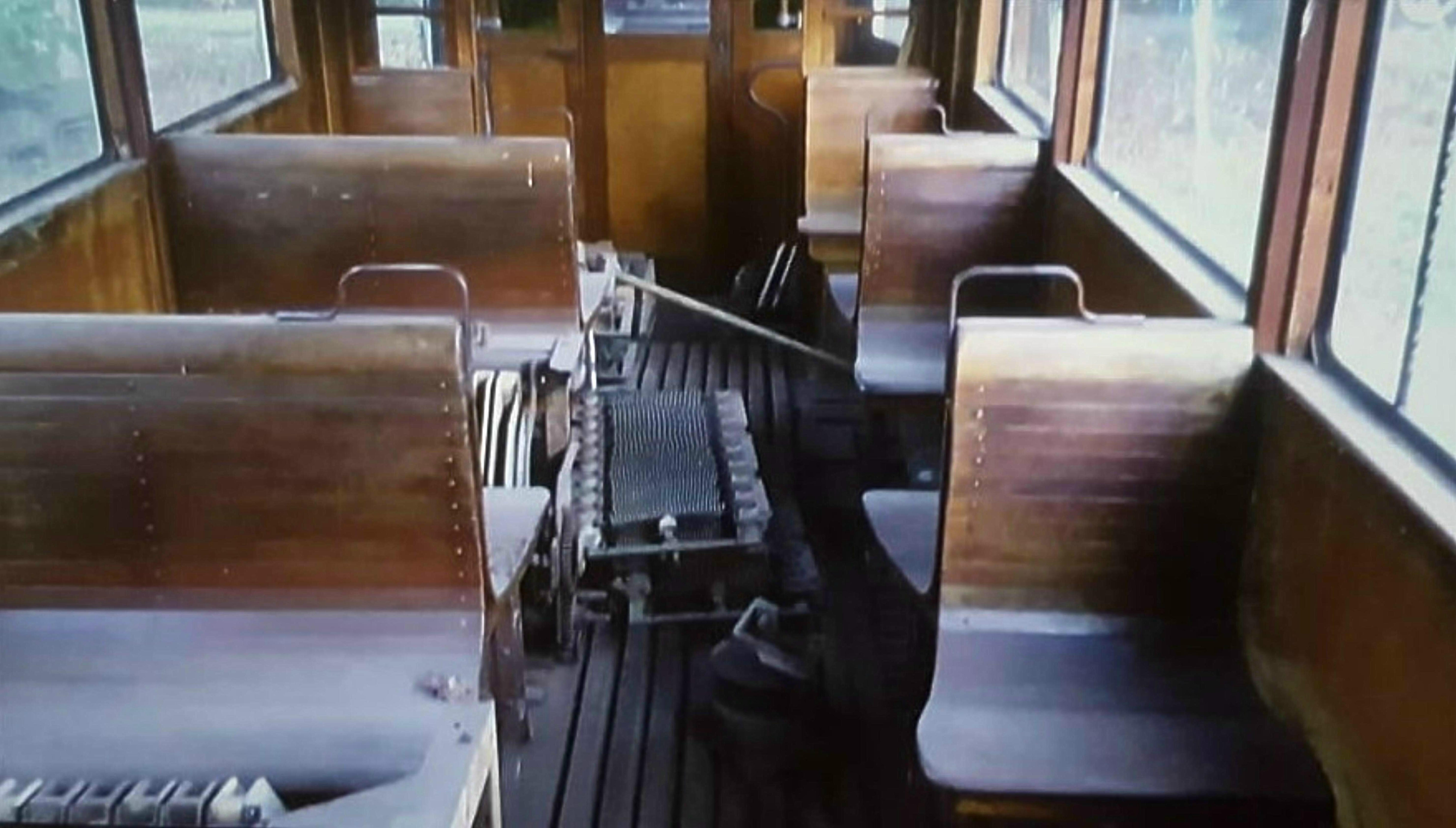 Dresden-Niedersedlitz - Kreischa. Heimkehr des Triebwagens 240 004-1 der Lockwitztalbahn. Der in Erfurt abgestellte Wagen sollte verschrottet werden.Die Bürgerstiftung Kreischa e.V. hat das mit Unterstützung des Modelleisenbahnclub e.V. Kreischa verhindern können